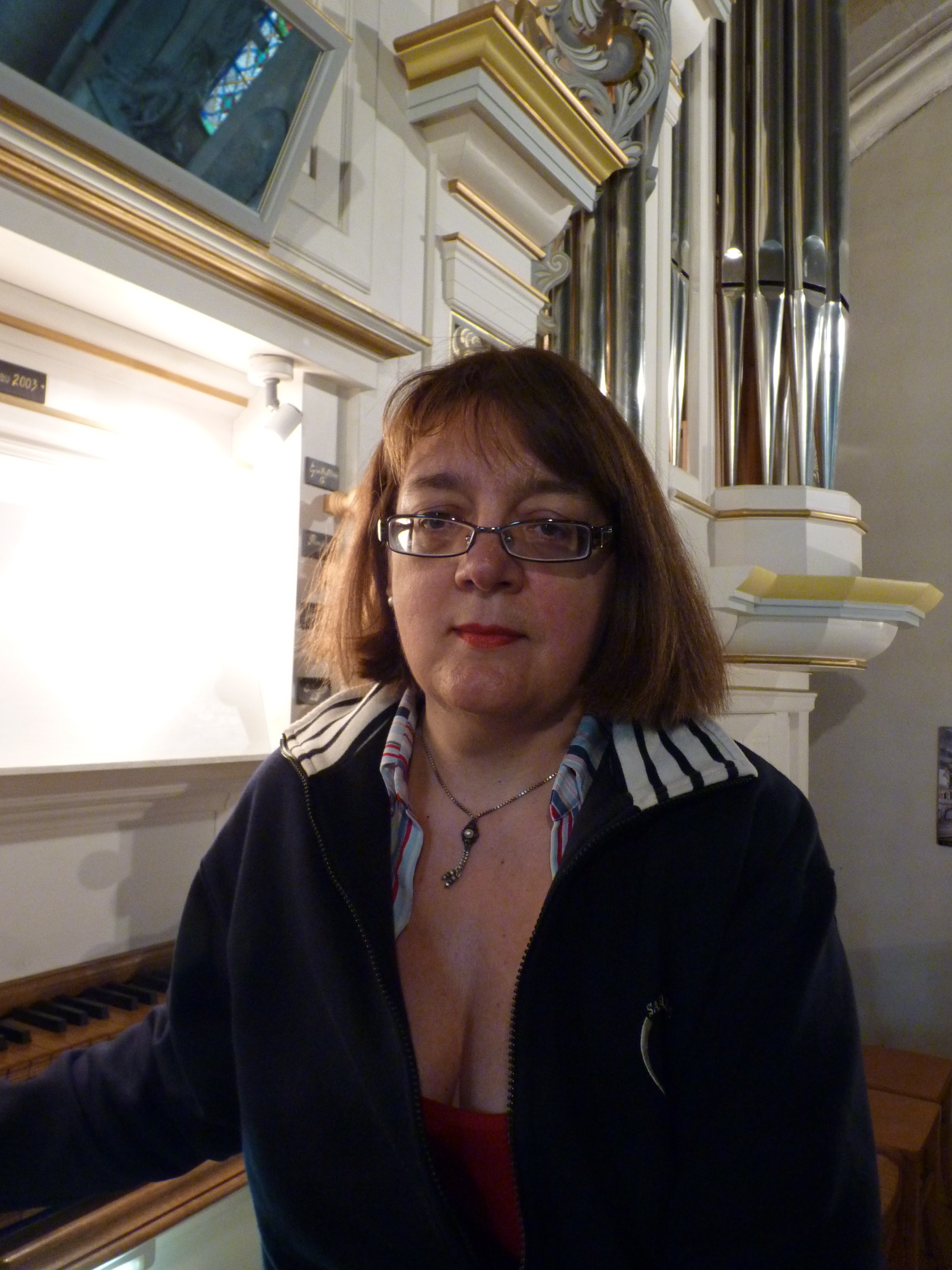 Helga Schauerte-Maubouet à Pontaumur lors de la VIe académie d'orgue.